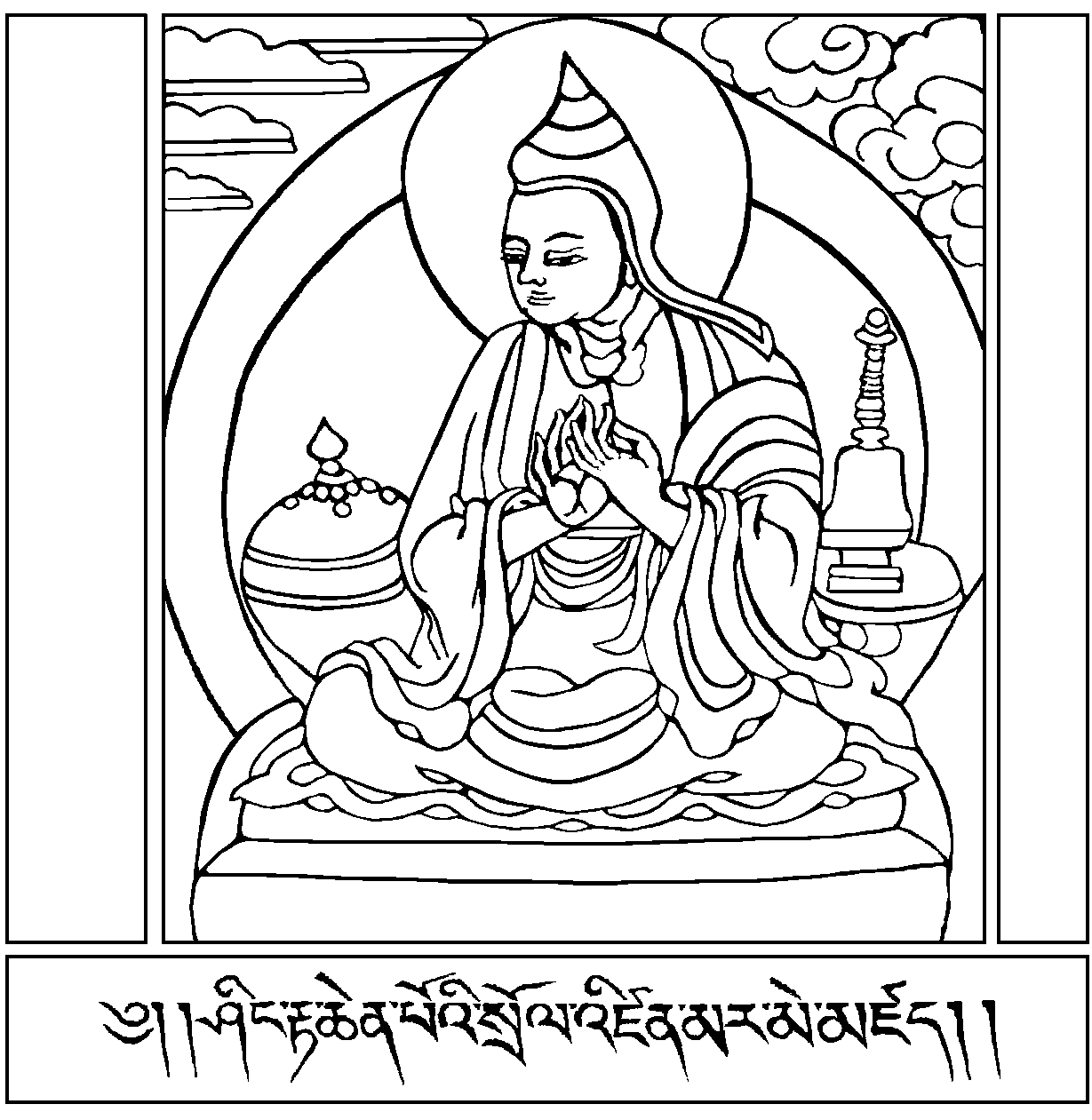 Hình được phép công bố của trang vi: ACIP Thể loại:Đồ tượng Phật giáo